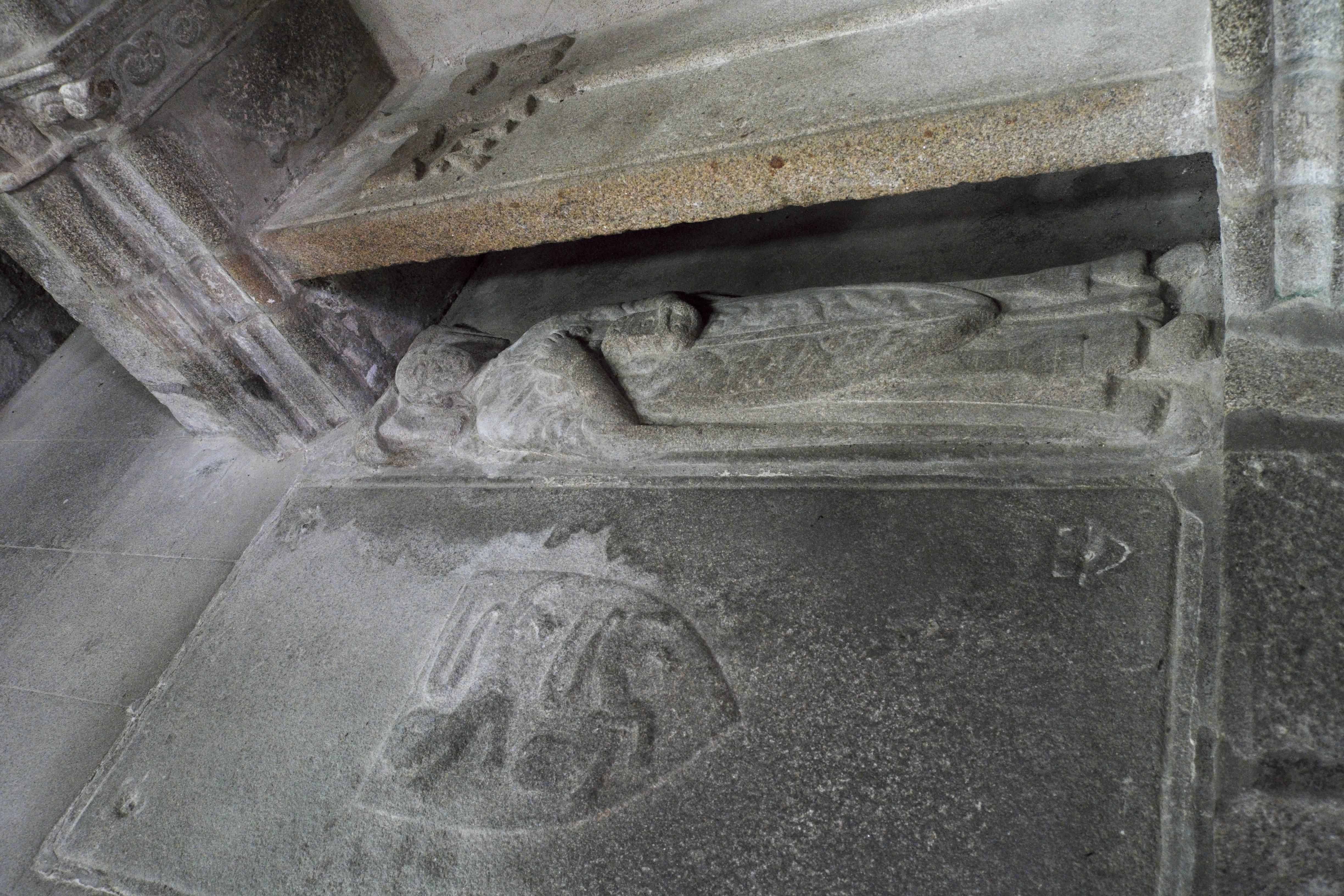 Abteikirche Saint-Barthélémy in Bénévent-l’Abbaye im Département Creuse (Nouvelle-Aquitaine/Frankreich), Wandnischengrab